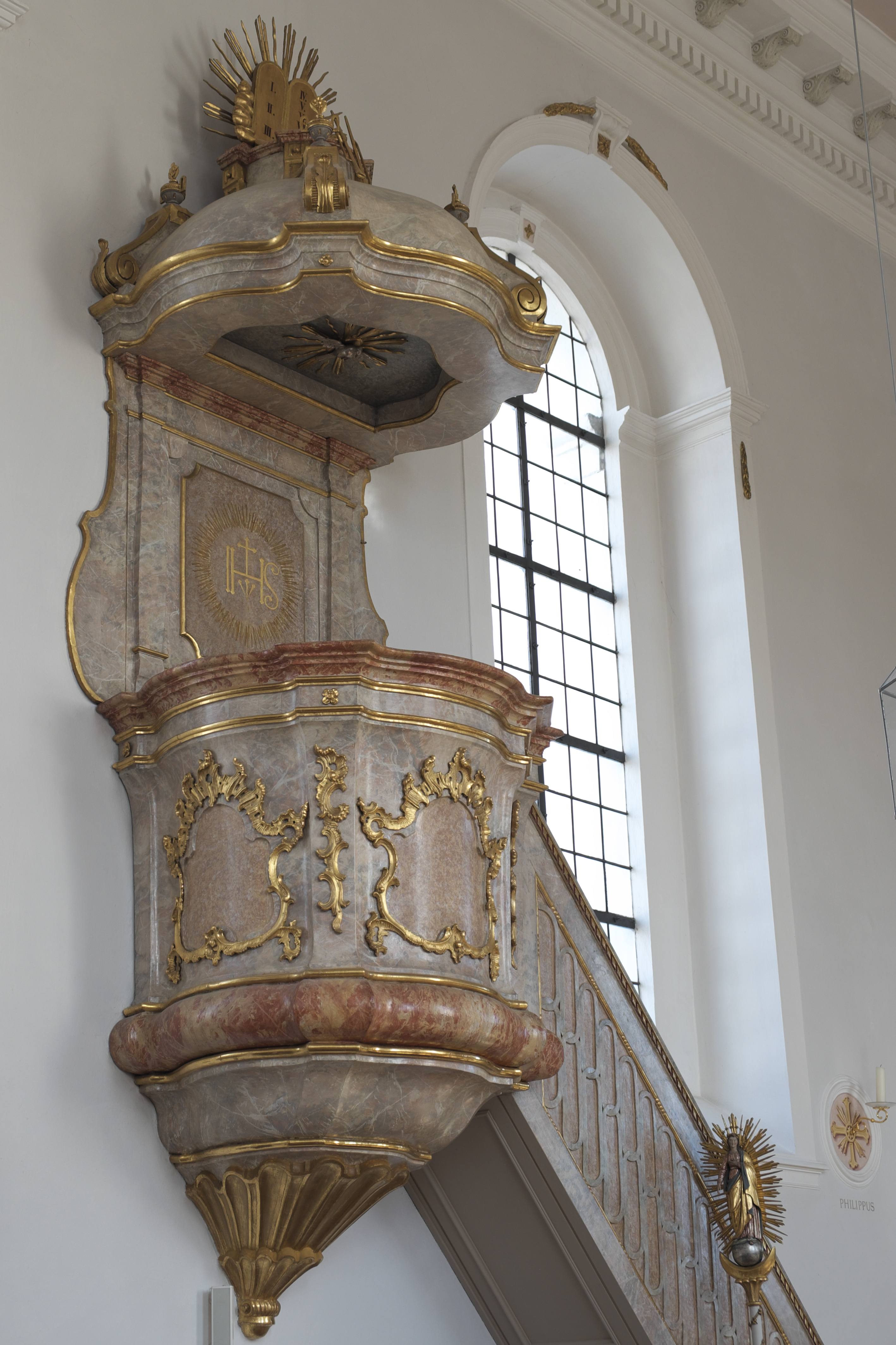 Katholische Pfarrkirche St. Bartholomäus in Epfach (Denklingen) im Landkreis Landsberg am Lech (Bayern/Deutschland), Kanzel aus dem späten 18. Jahrhundert